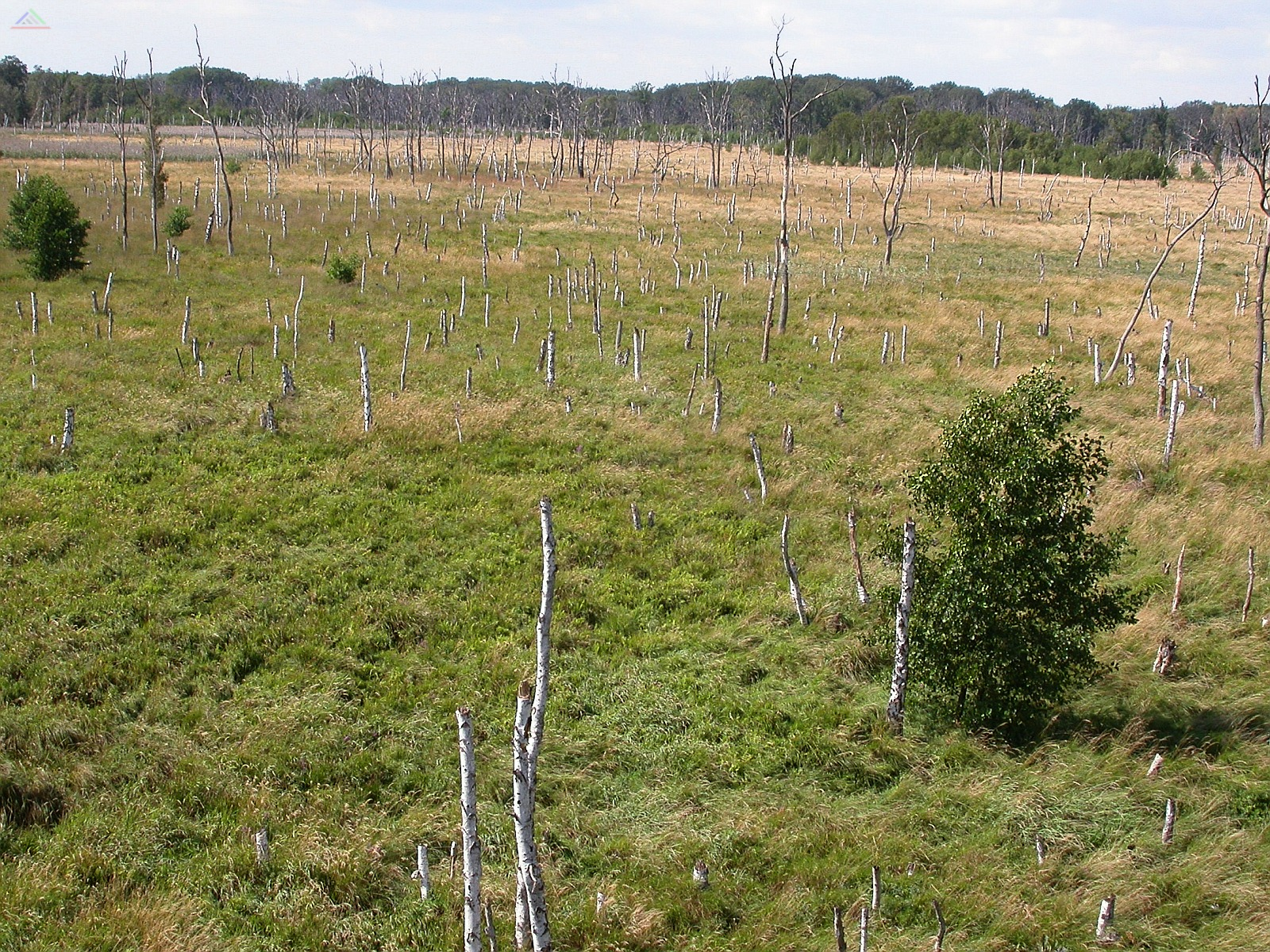 Ehemaliger Birkenwald im Müritz-Nationalpark im August 2003